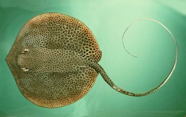 Скат-хвостокол с восточнофо побережья Австралии